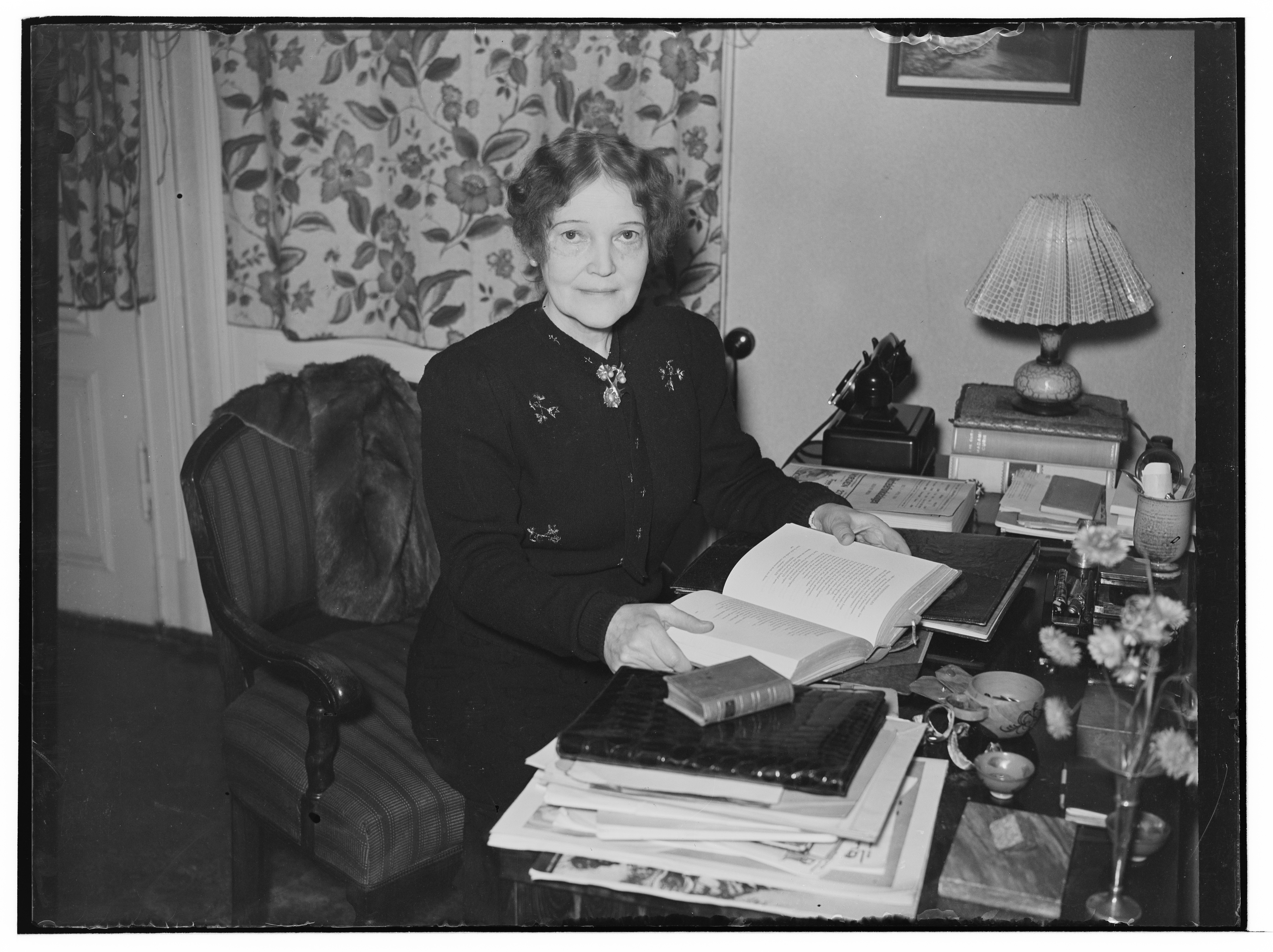 Cally Monrad. Forfatterinne, sangerinne